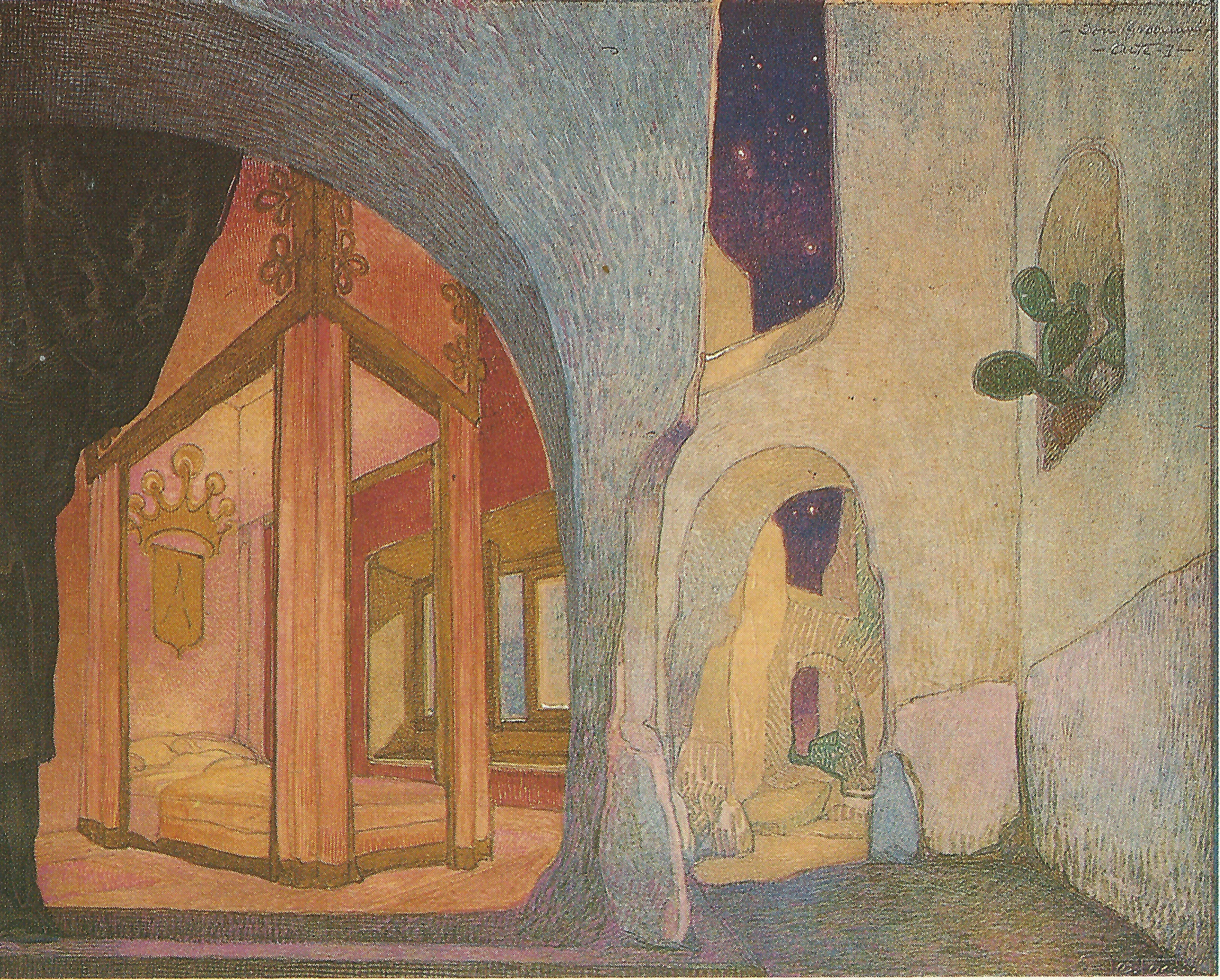 19.D. Giovanni, acto I, 1931, acuarela, 33 x 41 cm. (Museo Néstor).